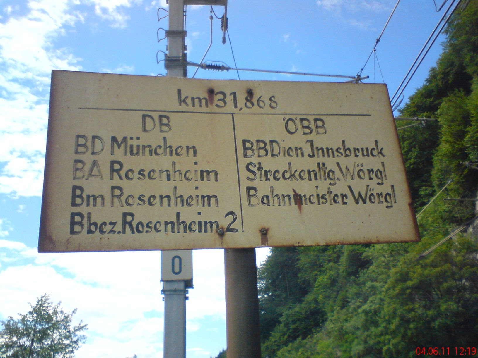 Tafel an der Grenze zw. Kiefersfelden und Kufstein